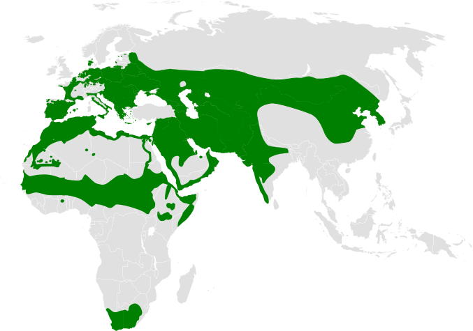 Galerida distribution map